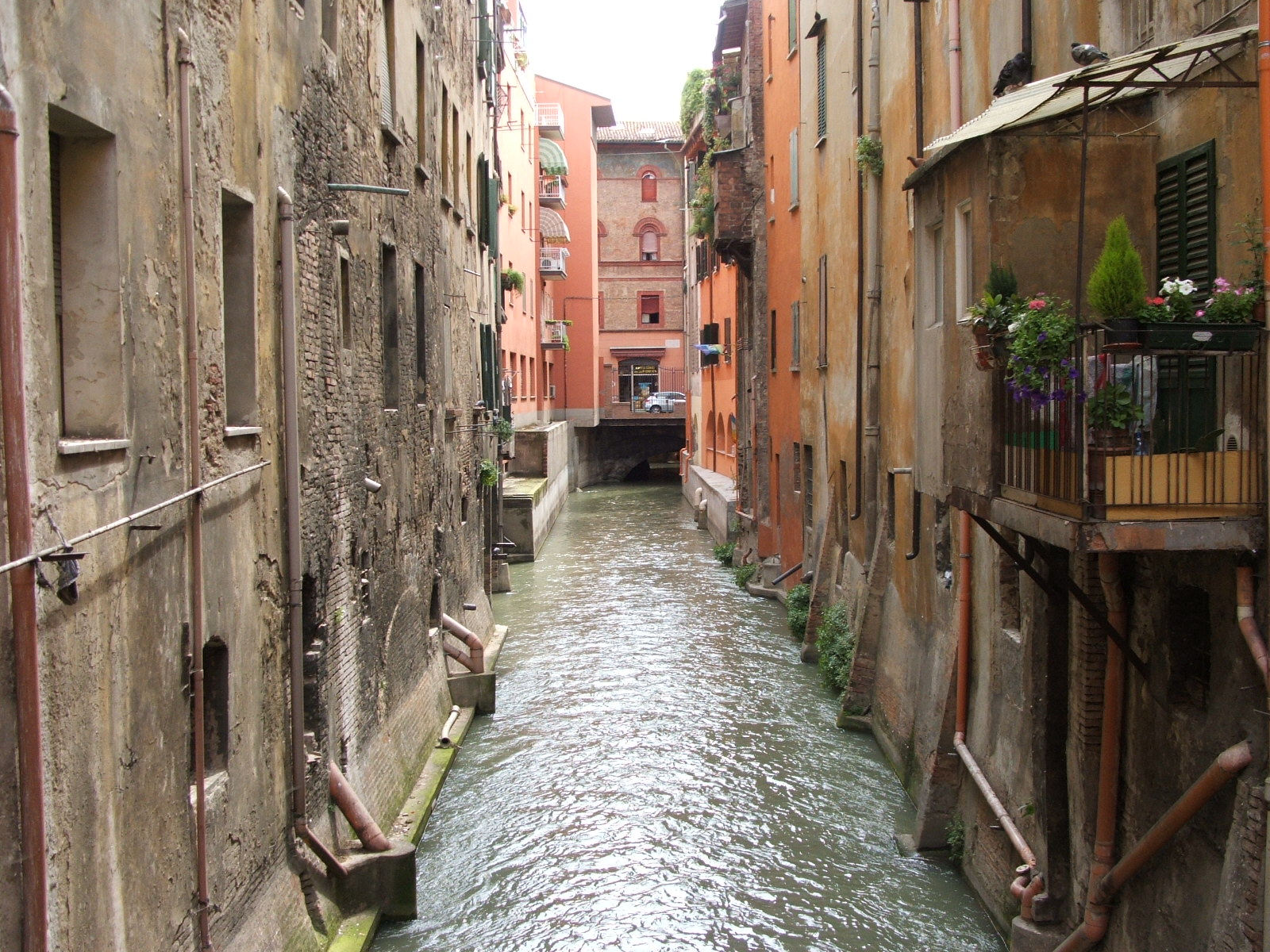 Bologna, via Piella - canale delle Moline